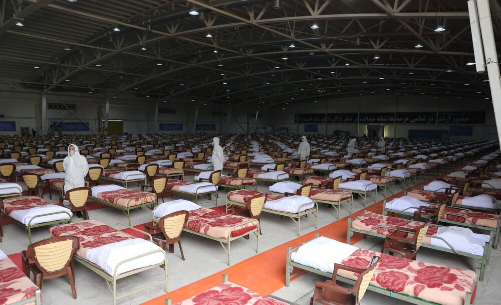 مجتمع بیمارستانی و نقاهتگاه ۲۰۰۰ تختخوابی شهید دکتر هجرتی